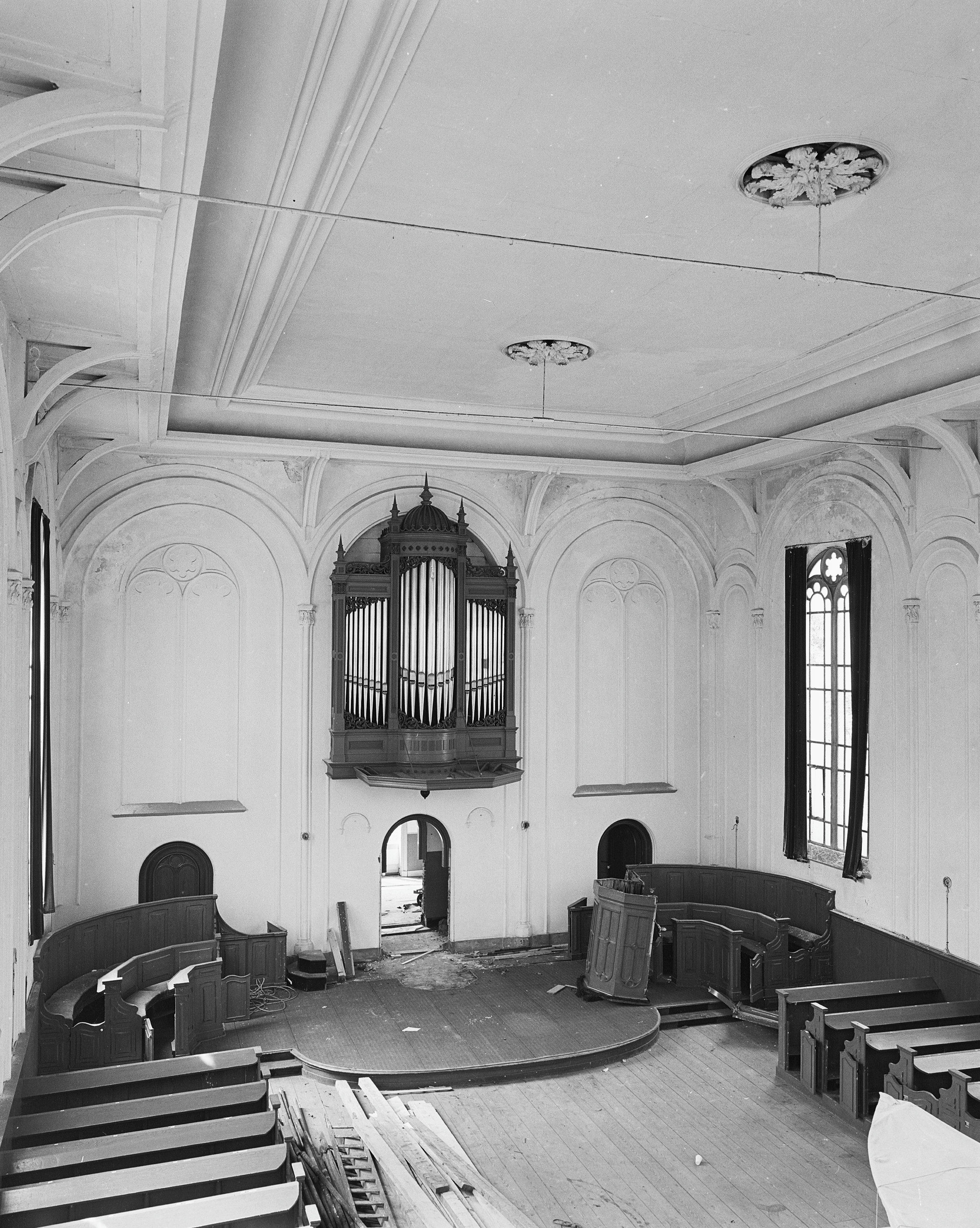 Doopsgezinde kerk: interieur